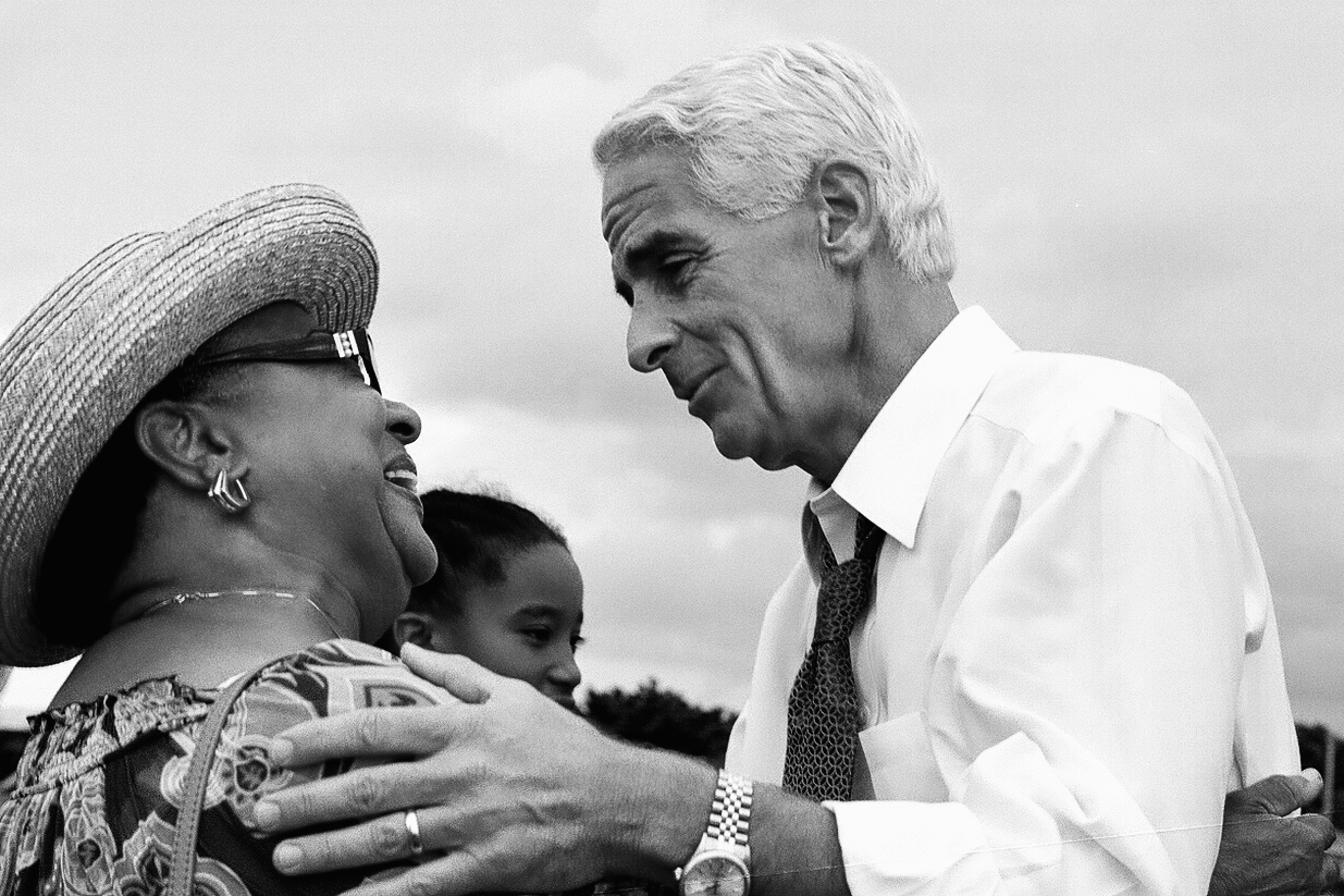 Florida Governor hopeful Charlie Crist. Nikon EM 50mm 1:2 Film Kodak 200